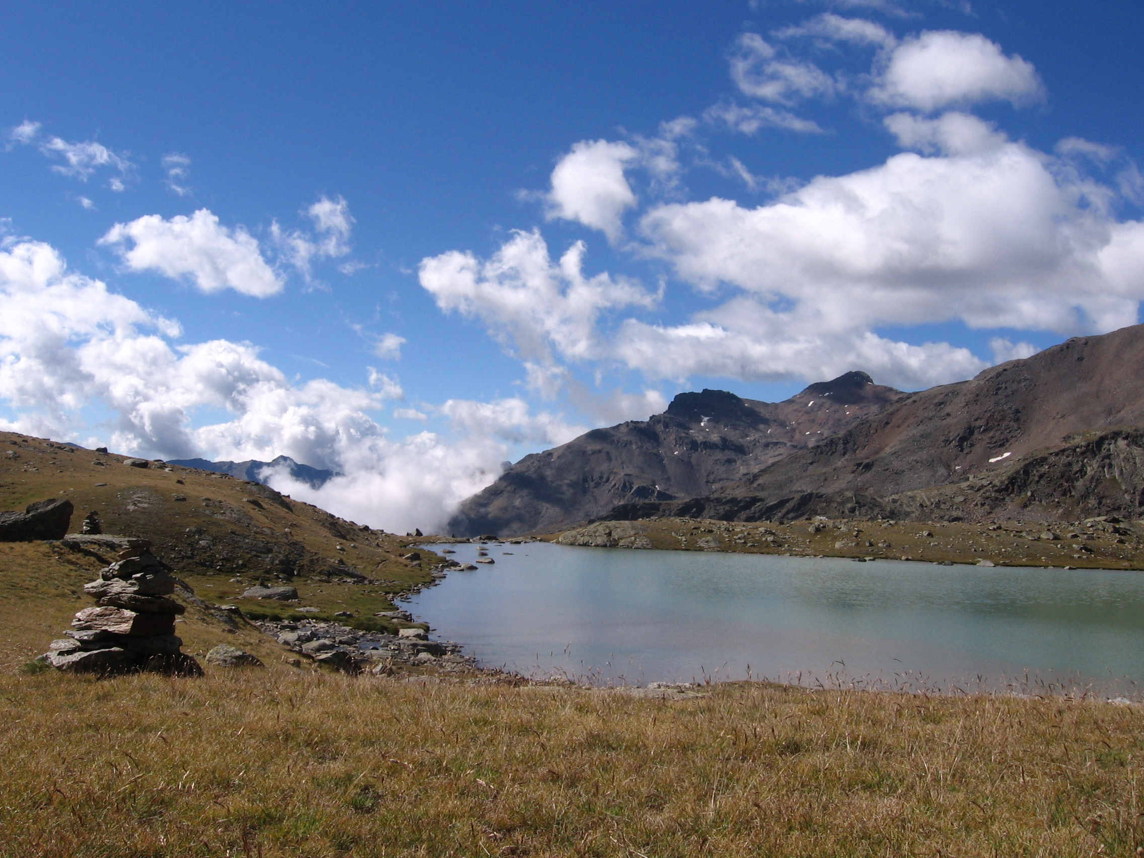 Autore: Rebecca South; Uno dei laghi Sternai con i caratteristici ometti segnavia. Val di Saènt, provincia di Trento, agosto 2006